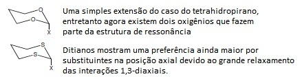 Efeitos observados em Dioaxanos e Ditianos